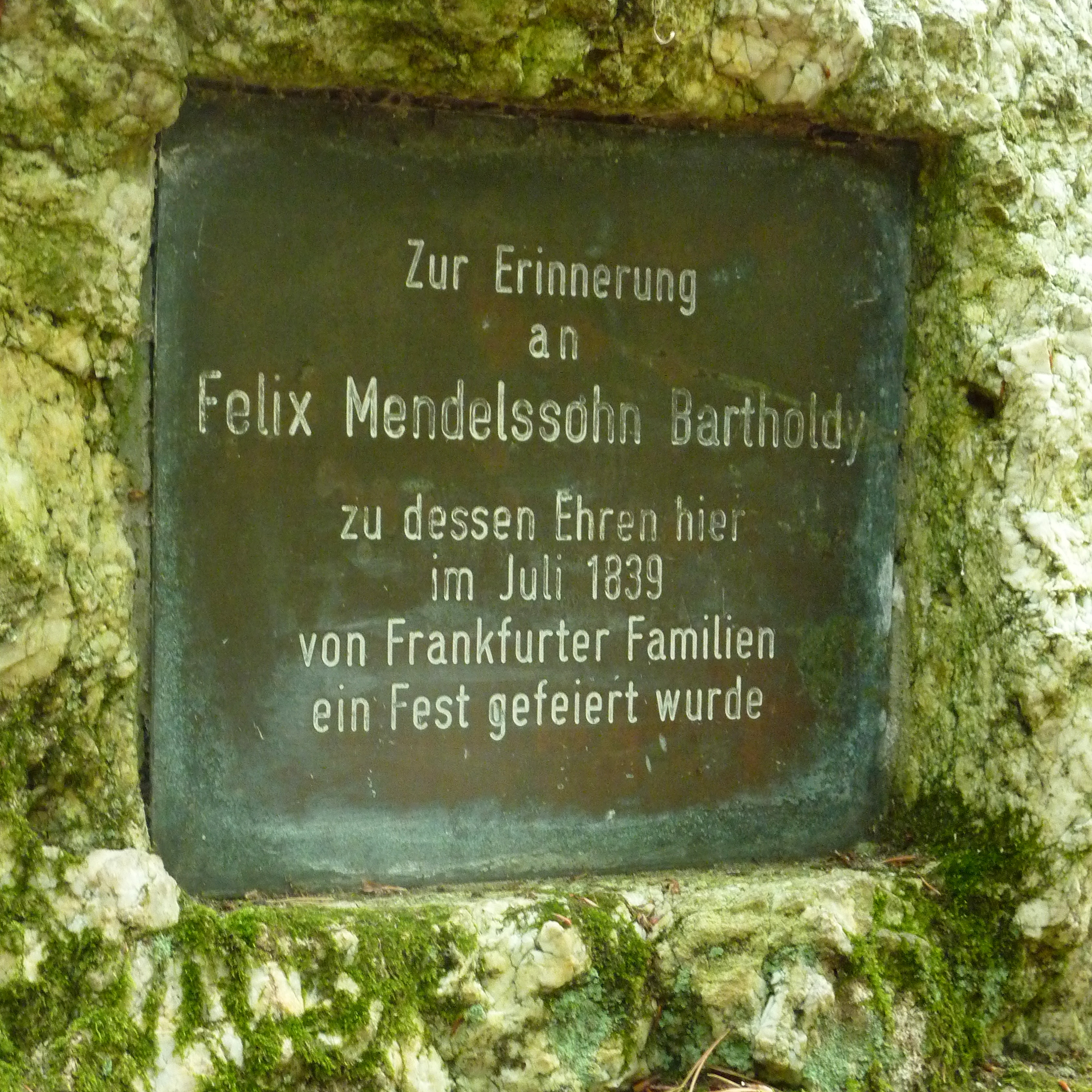 Die Mendelssohnruhe ist eine kleine Waldlichtung mit Gedenkstein auf dem Gebiet der Stadt Frankfurt am Main. Die Lichtung im Süden des Frankfurter Stadtwaldes liegt auf der Gemarkung des südmainischen Stadtteils Sachsenhausen. Der Ort ist dem Andenken an den Komponisten Felix Mendelssohn Bartholdy gewidmet. Foto des Gedenksteins vor Ort vom August 2018